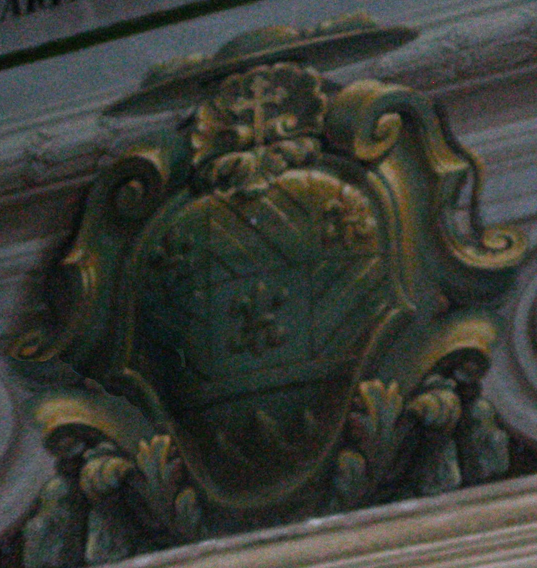 Stemma del Cardinal Gaetano Bedini al centro della Sala Urbana a Bologna